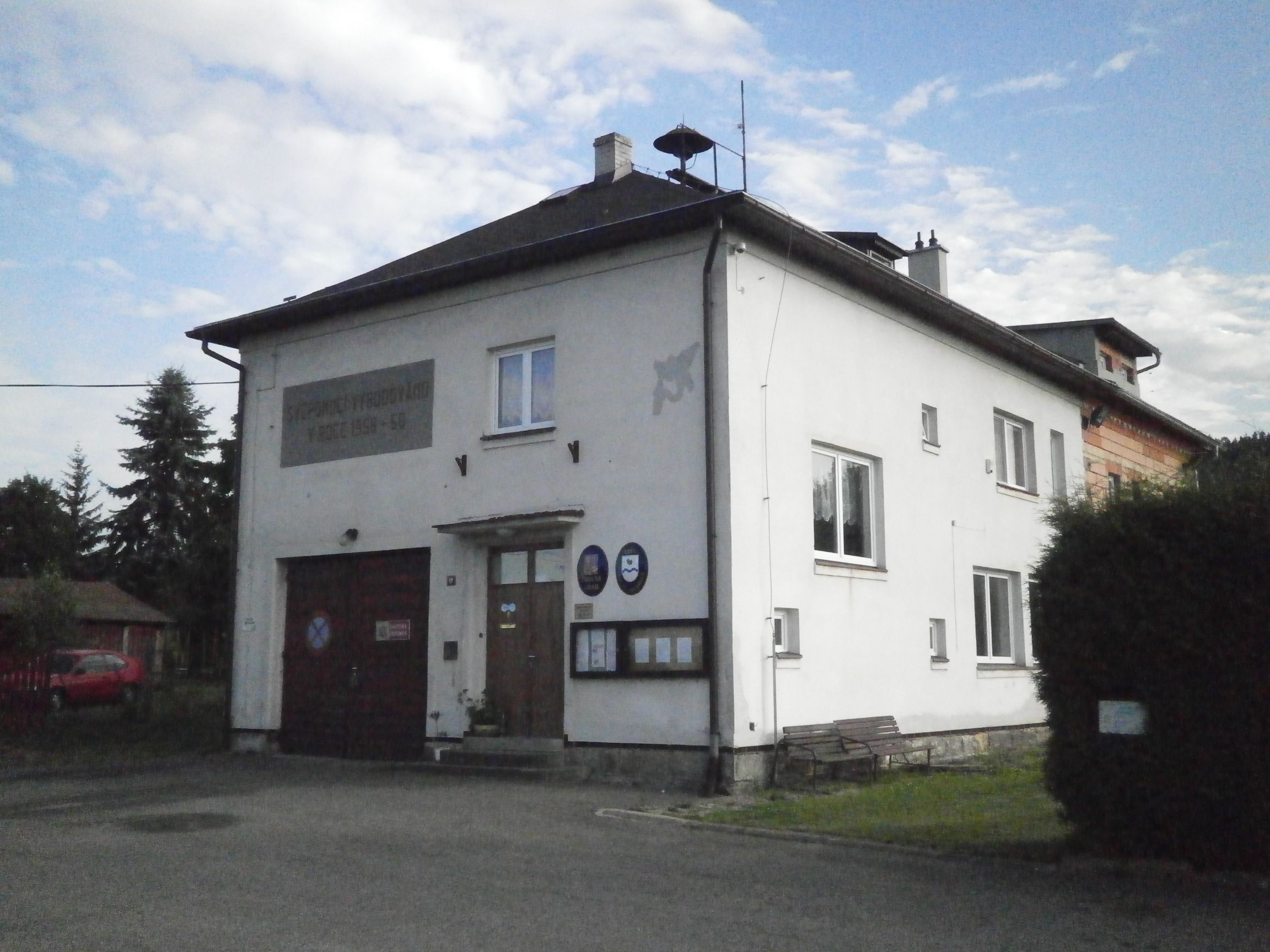 Dolní Brusnice - obecní úřad a požární zbrojnice (č.p.17)